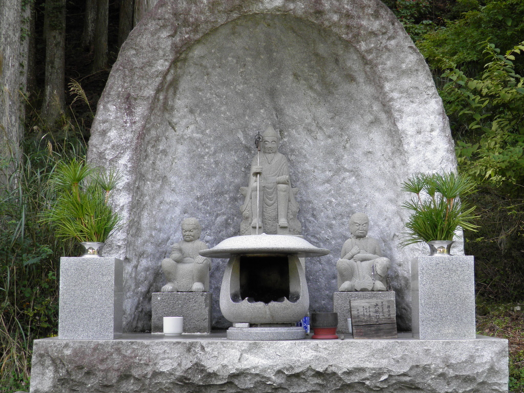 虻トンネル東側口にある観音峯登山口の駐車場にある役行者像。安政3（1856）年5月に紀州（和歌山県）日高郡の日ノ出講が遠方から運び虻峠に祭祀したもの。虻トンネルが開通したためか、この地に移設された。（奈良県吉野郡天川村）